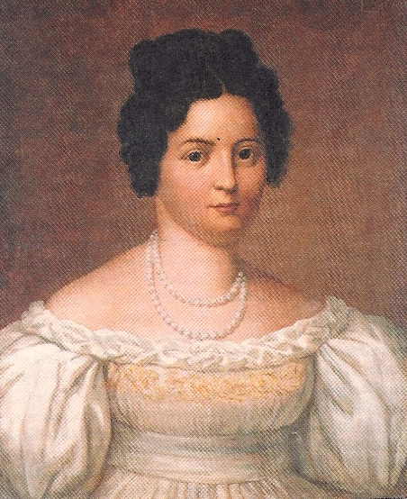 Cousine und Jugendliebe Heinrich Heines Tochter von Heinrich Heines Onkel Salomon